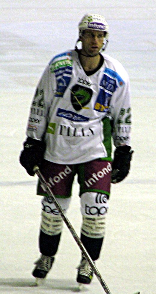 Greg Kužnik